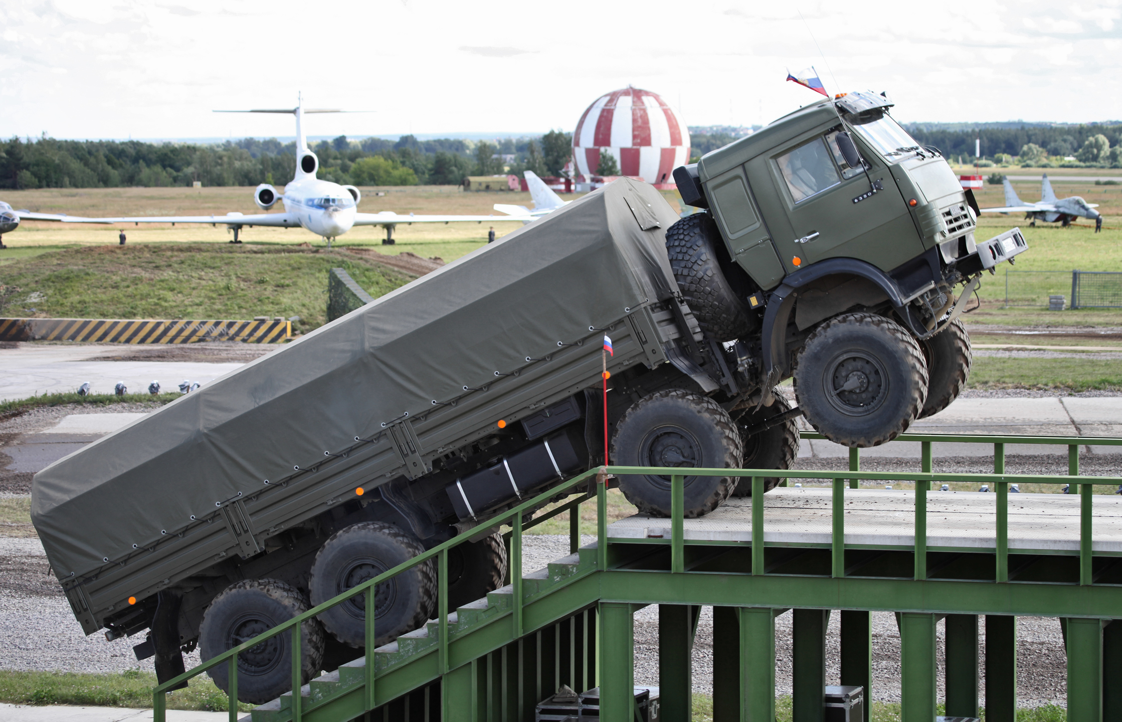 КАМАЗ-6350 (KAMAZ-6350)